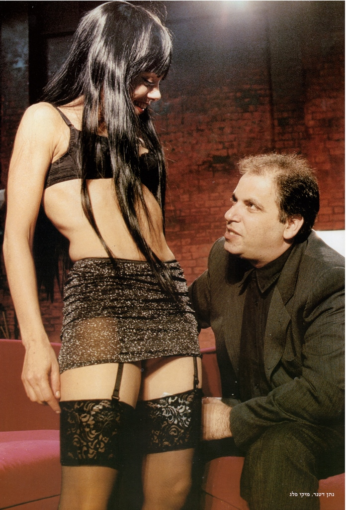 מיקי פלג-רוטשטיין בתפקיד אליס לצד נתן דטנר בהצגה "קרוב יותר"